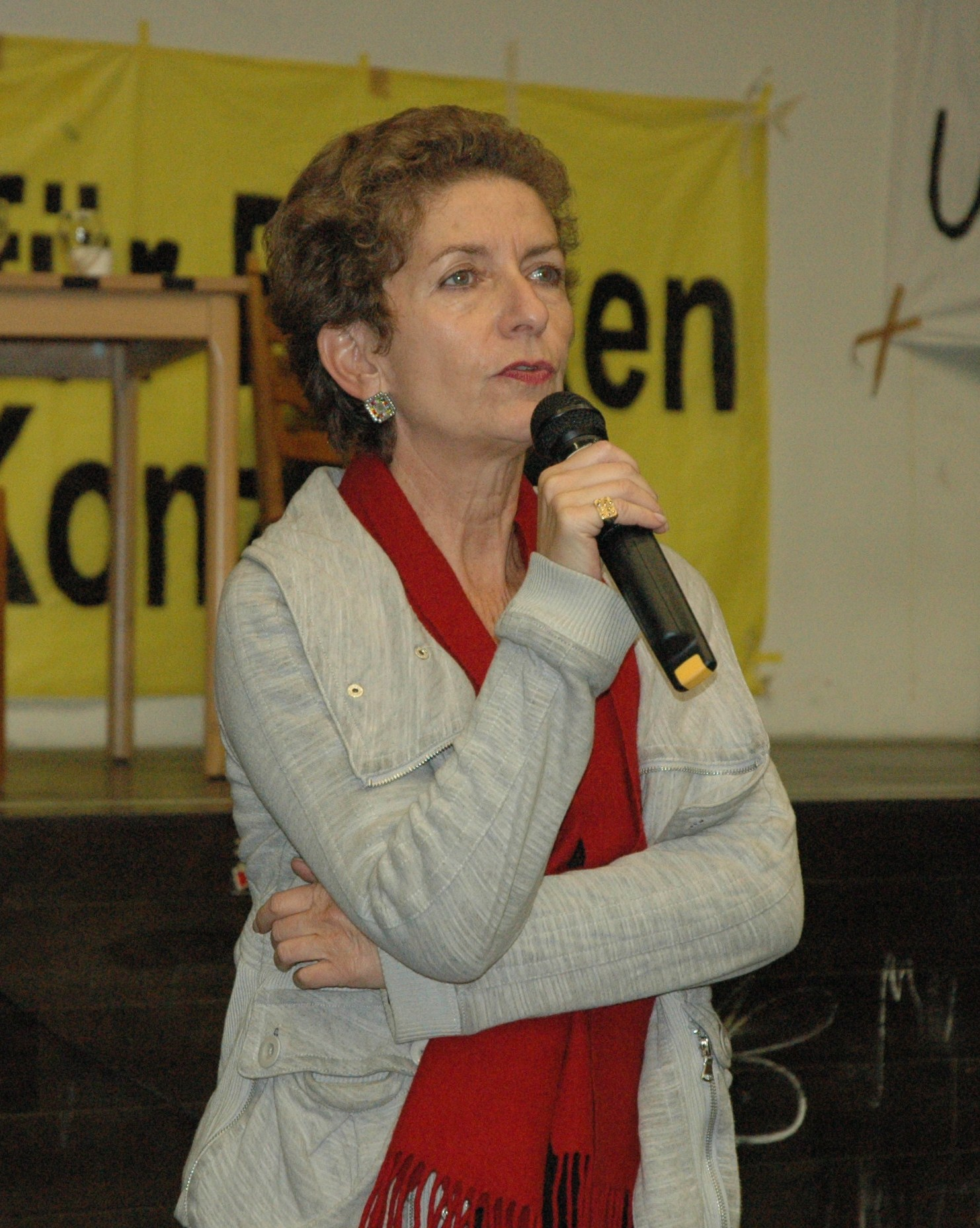 Ruth Beckermann nach einer Filmvorführung von "Arena besetzt" im besetzten Audimax